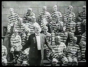 Cцена из "Заключённого N 13" Бастера Китона. Казнь Бастера сорвалась, и недовольная аудитория (заключённые и торговец арахисом на переднем плане) высказывают свои претензии Палачу.Scene from comedy Convict 13 (1920) (directed by Buster Keaton and Ed Cline). After failed hanging of Buster, "the audience" of fellow inmates boos the inept Hangman.